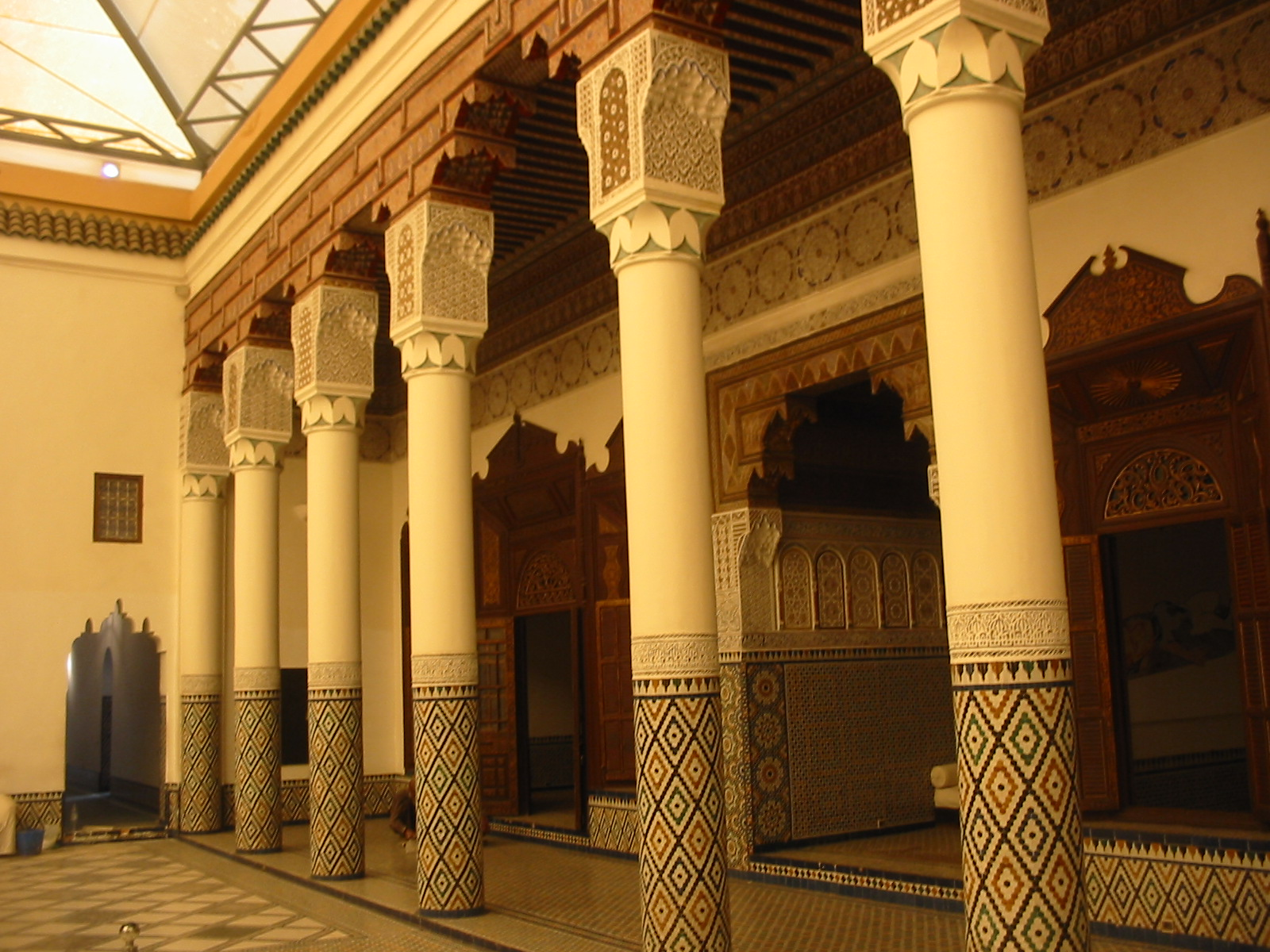 Museum of Marrakech: Le musée de marrakech constitue une excursion depuis marrakech tres interessante, il est logé dans le Dar Menebhi Palace, construit à la fin du 19ème siècle par Mehdi Menebhi. Le palais a été restauré avec soin par la Fondation Omar Benjelloun et converti en musée en 1997. La maison elle-même représente un exemple d'architecture andalouse classique, avec des fontaines dans la cour centrale, des salons traditionnels, un hammam et tilework complexes et des sculptures. grand atrium du musée (à l'origine d'une cour, maintenant recouvert de verre et tissu) contient un très grand morceau de plafond lustre-esque hung central composé de plaques de métal décorées avec de fines coupes géométriques et épigraphiques. Plusieurs caractéristiques de la cour d'origine, y compris les bassins et les mosaïques de sol-set ont été retenus. Le musée possède des expositions d'art marocain à la fois moderne et traditionnelle avec de beaux exemples de livres historiques, des pièces de monnaie et des poteries d'origine juive marocaine, berbère et cultures arabes.